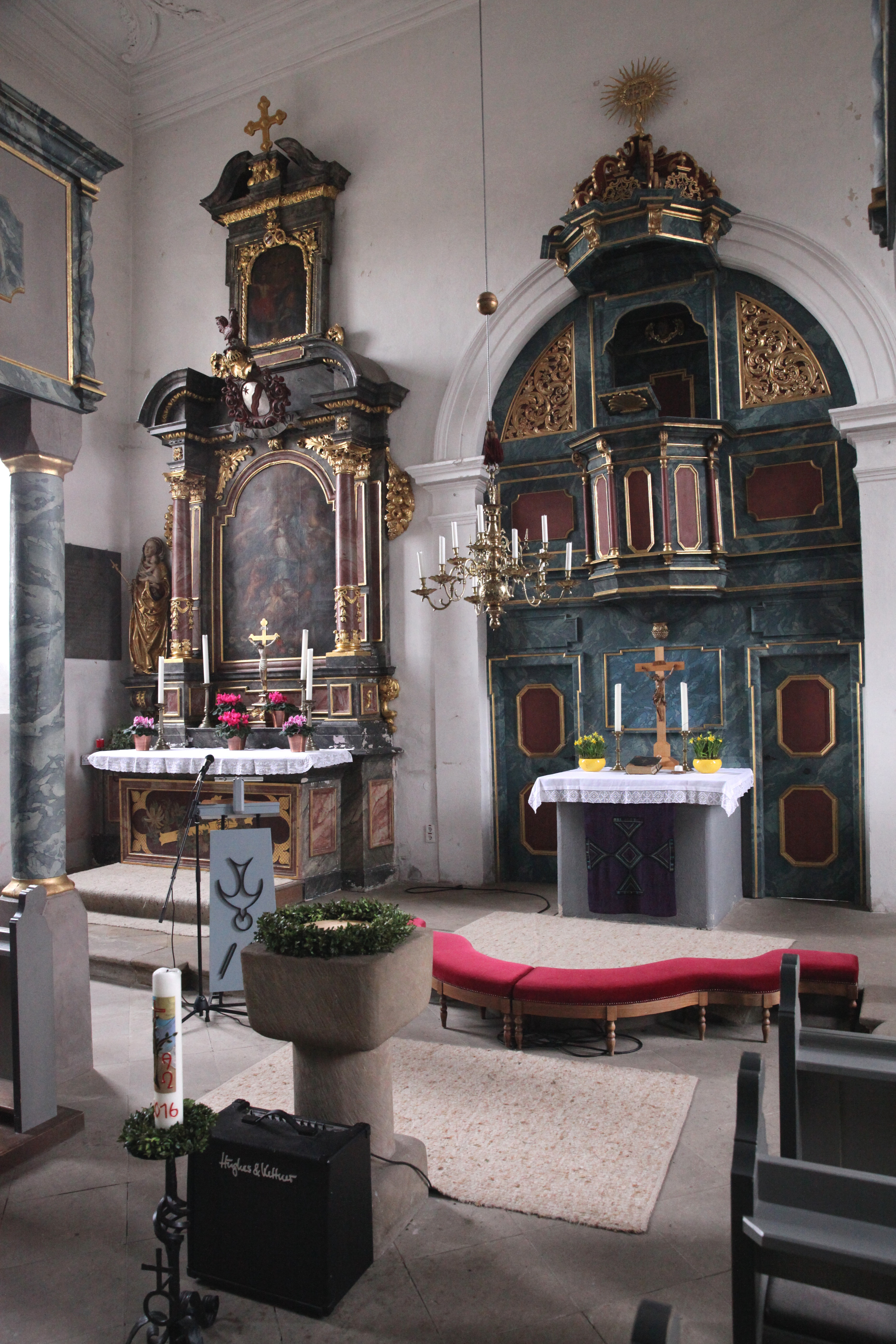 katholischer und evangelischer Altar in der ev. Pfarrkirche Untermerzbach